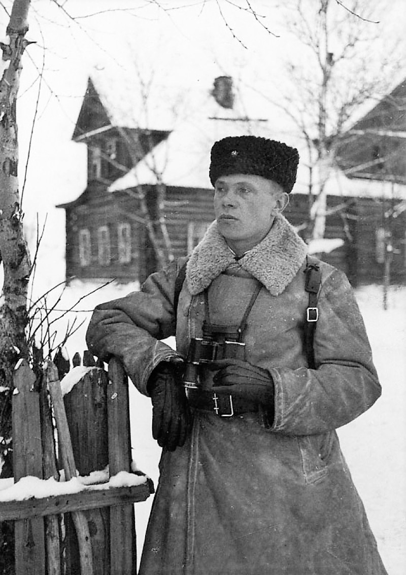 Командир 952-го стрелкового полка 268-й стрелковой дивизии подполковник Александр Иванович Клюканов. Ленинградский фронт. Зима 1942/1943 года